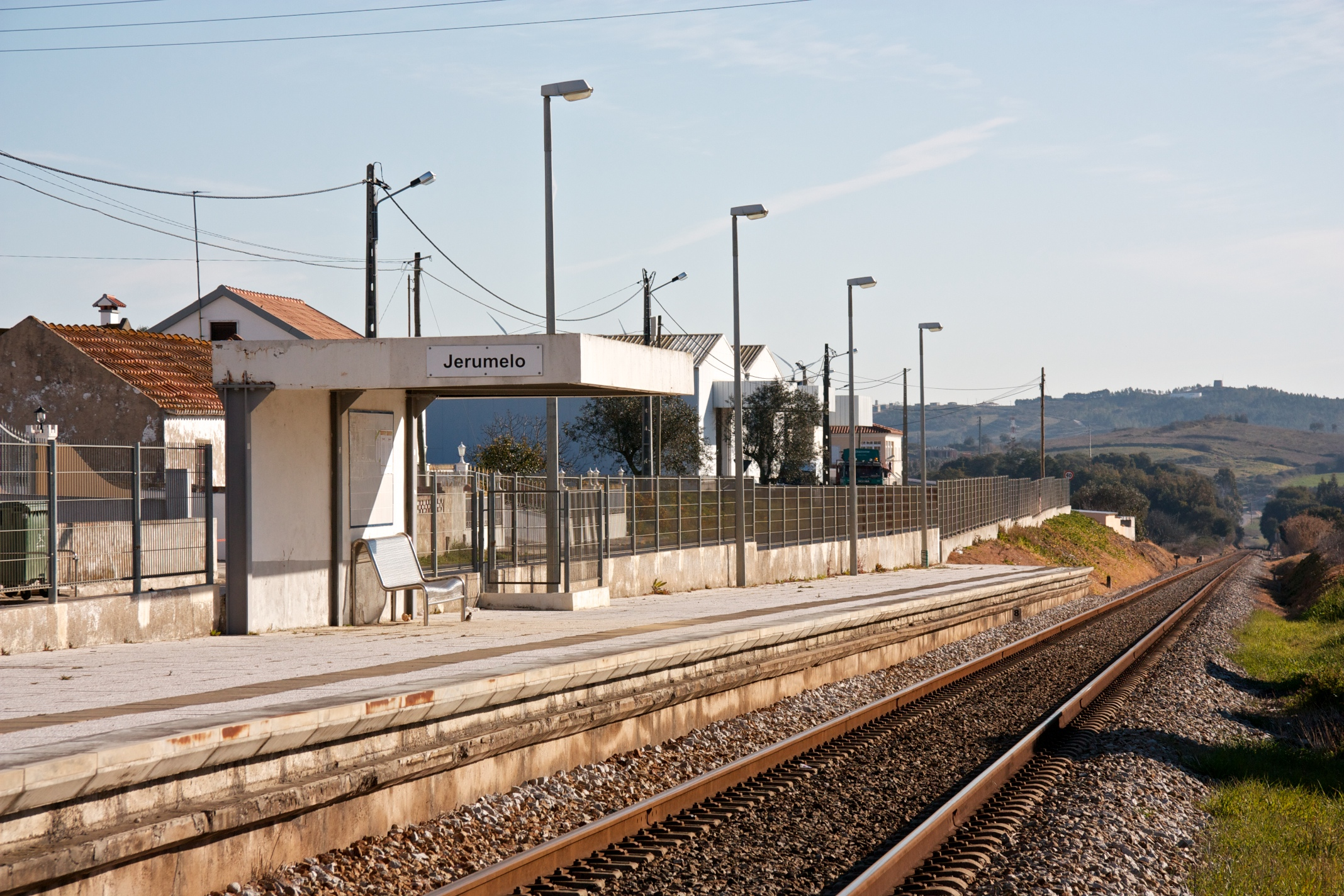 Tipo: A Apeadeiro Local: Jerumelo [Linha do Oeste, PK 41] Data e hora: 24 de Fevereiro de 2012 [09h24]